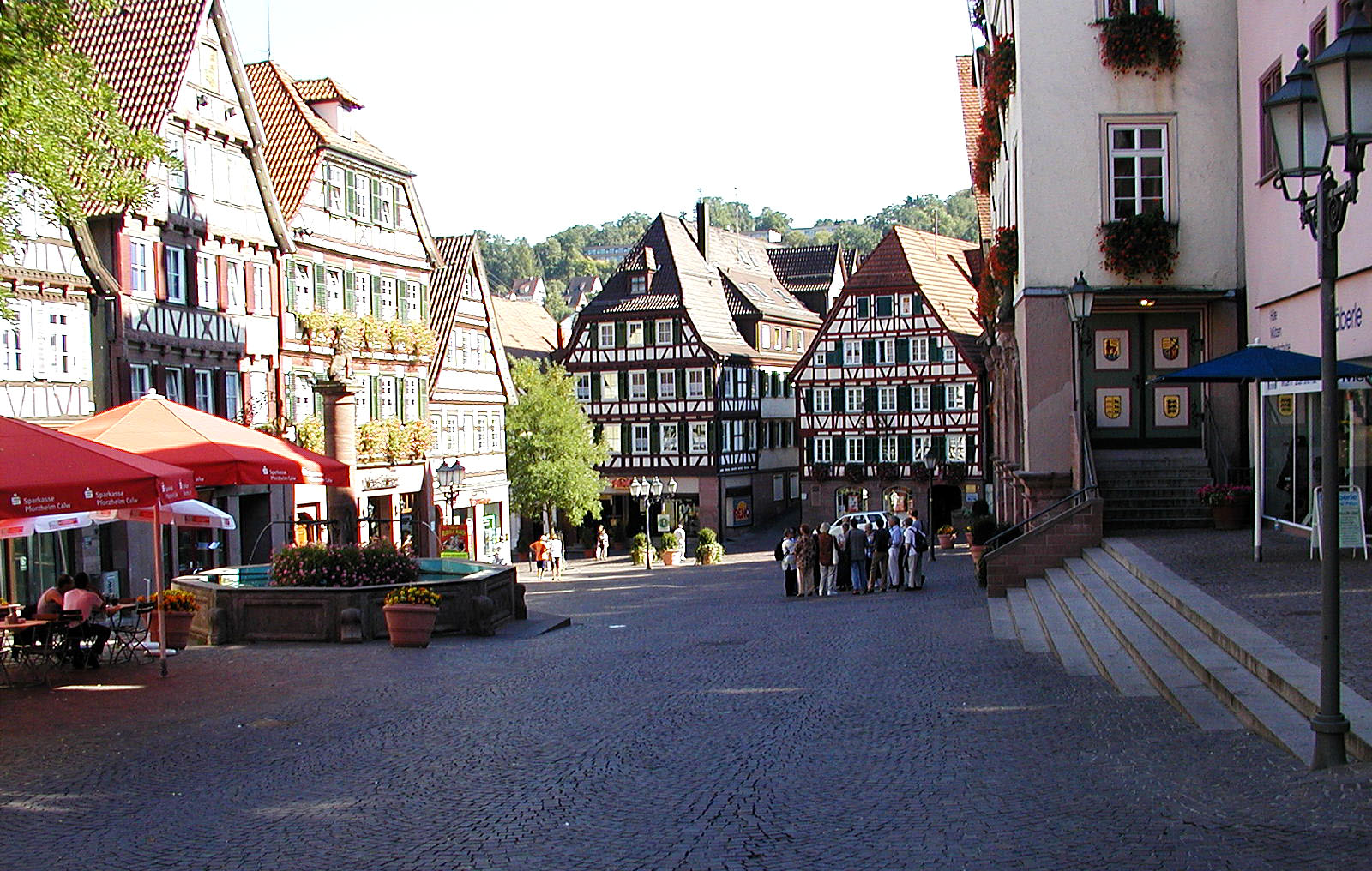 Marktplatz Calw